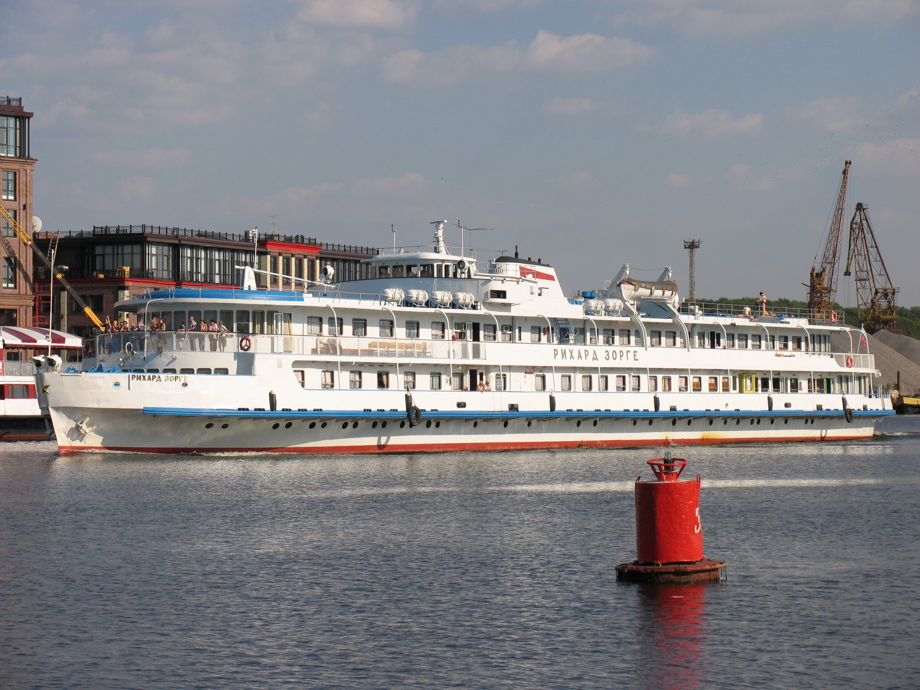 Речной двухпалубный круизный теплоход "Рихард Зорге" на Химкинском водохранилище.